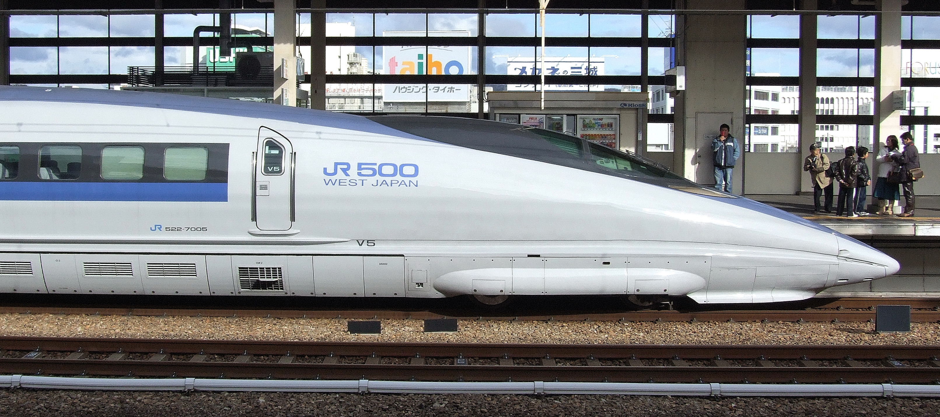 500系新幹線電車の先頭車両の先頭形状（V5編成）